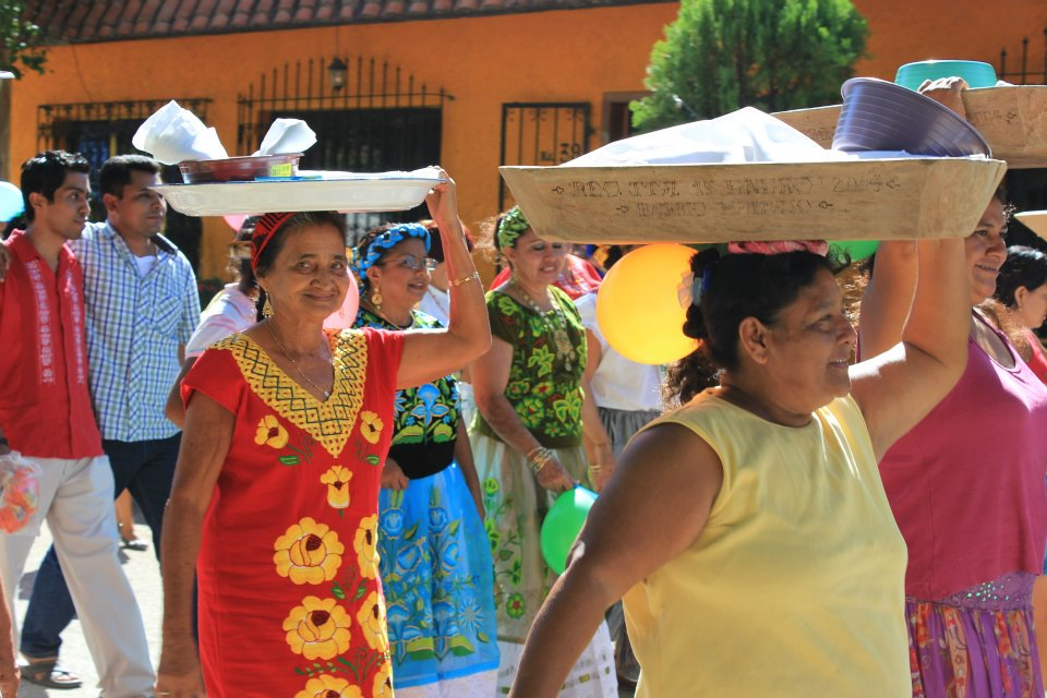 fotografia de Jorge Luis de los Santos Trujillo